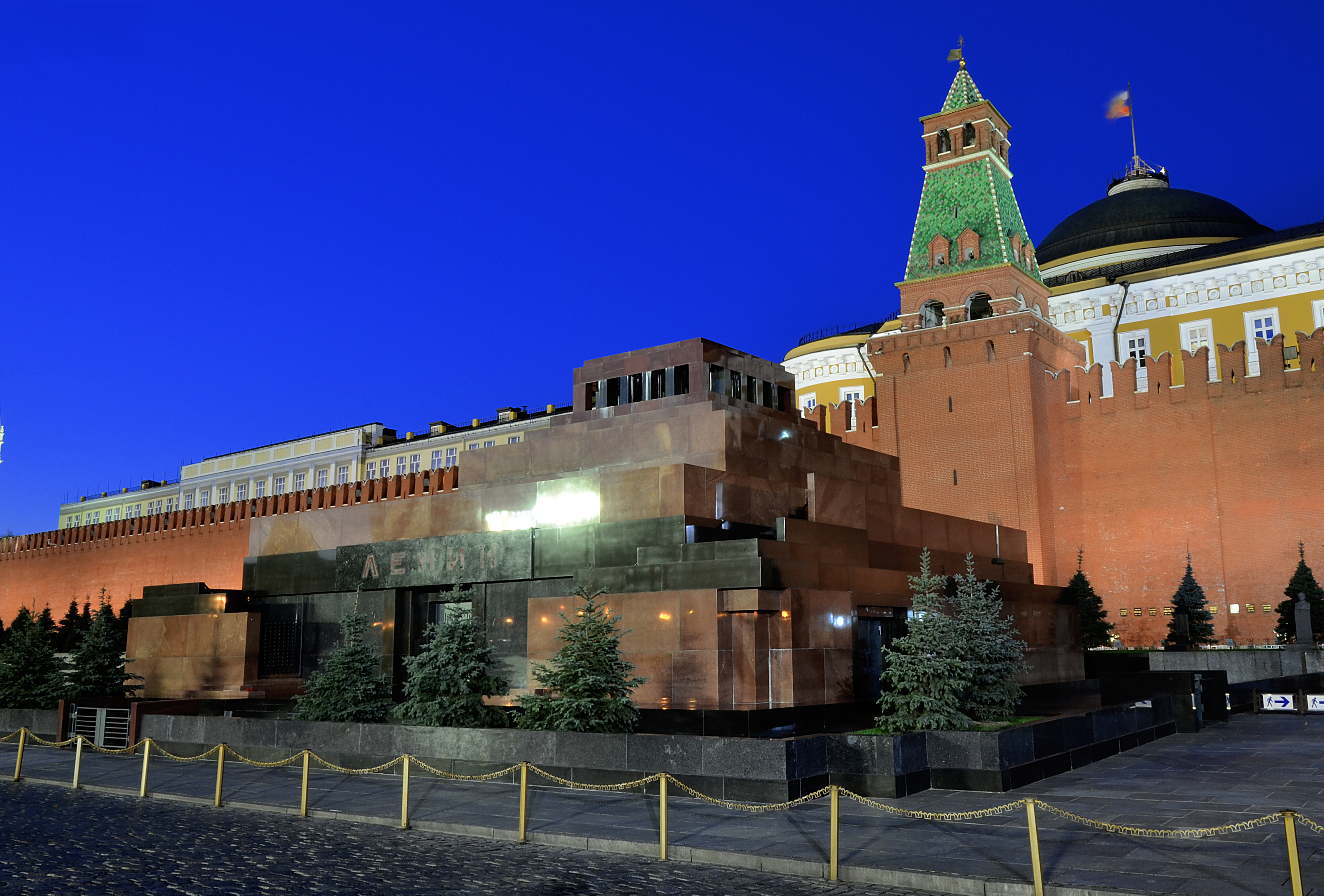 Можно увидеть здесь